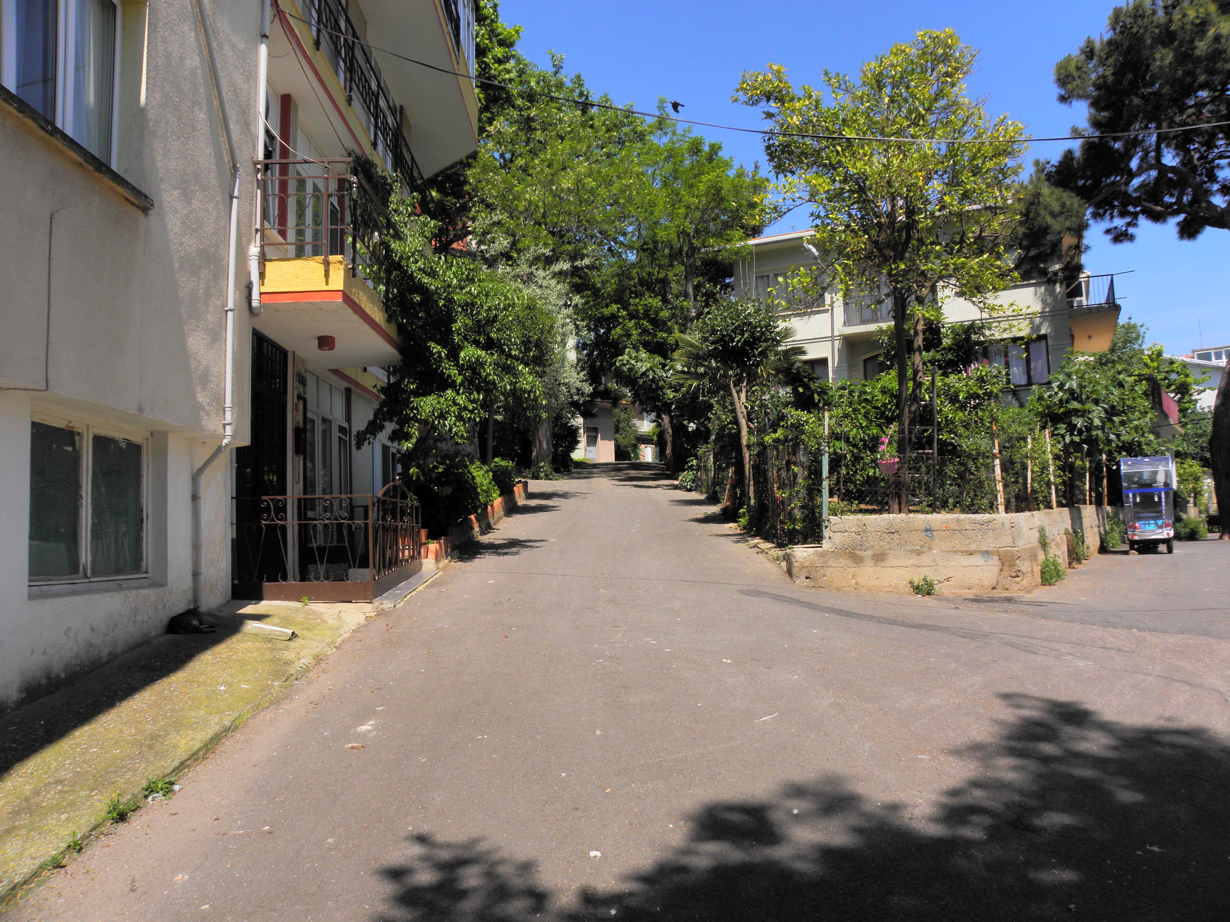 Burgazada içerisinden bir sokak görüntüsü